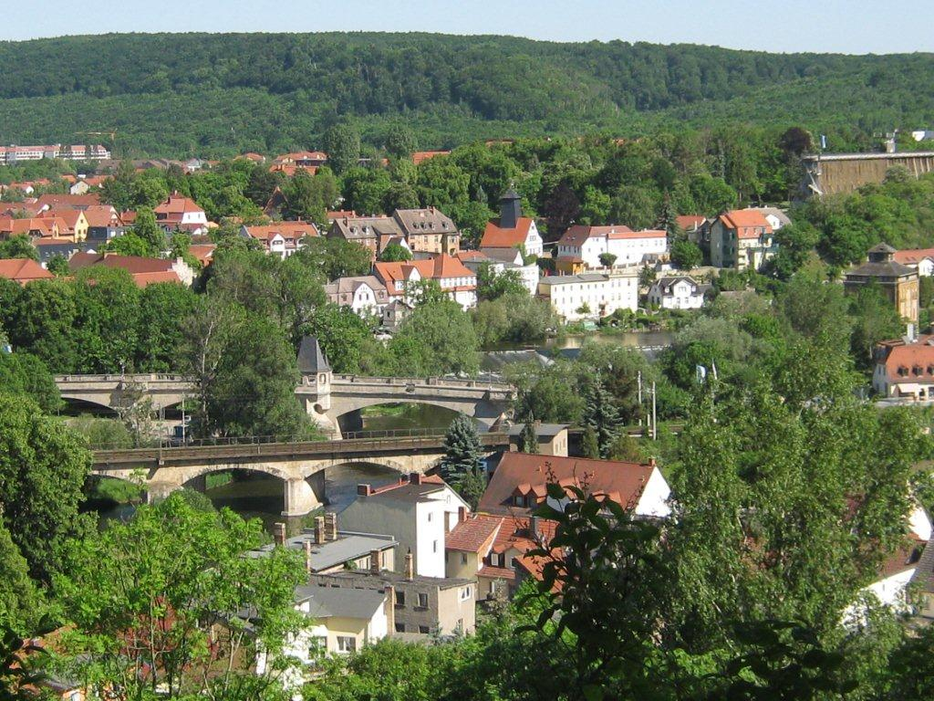 Fotografischer Blick auf Bad Kösen mit den Brücken über die Saale